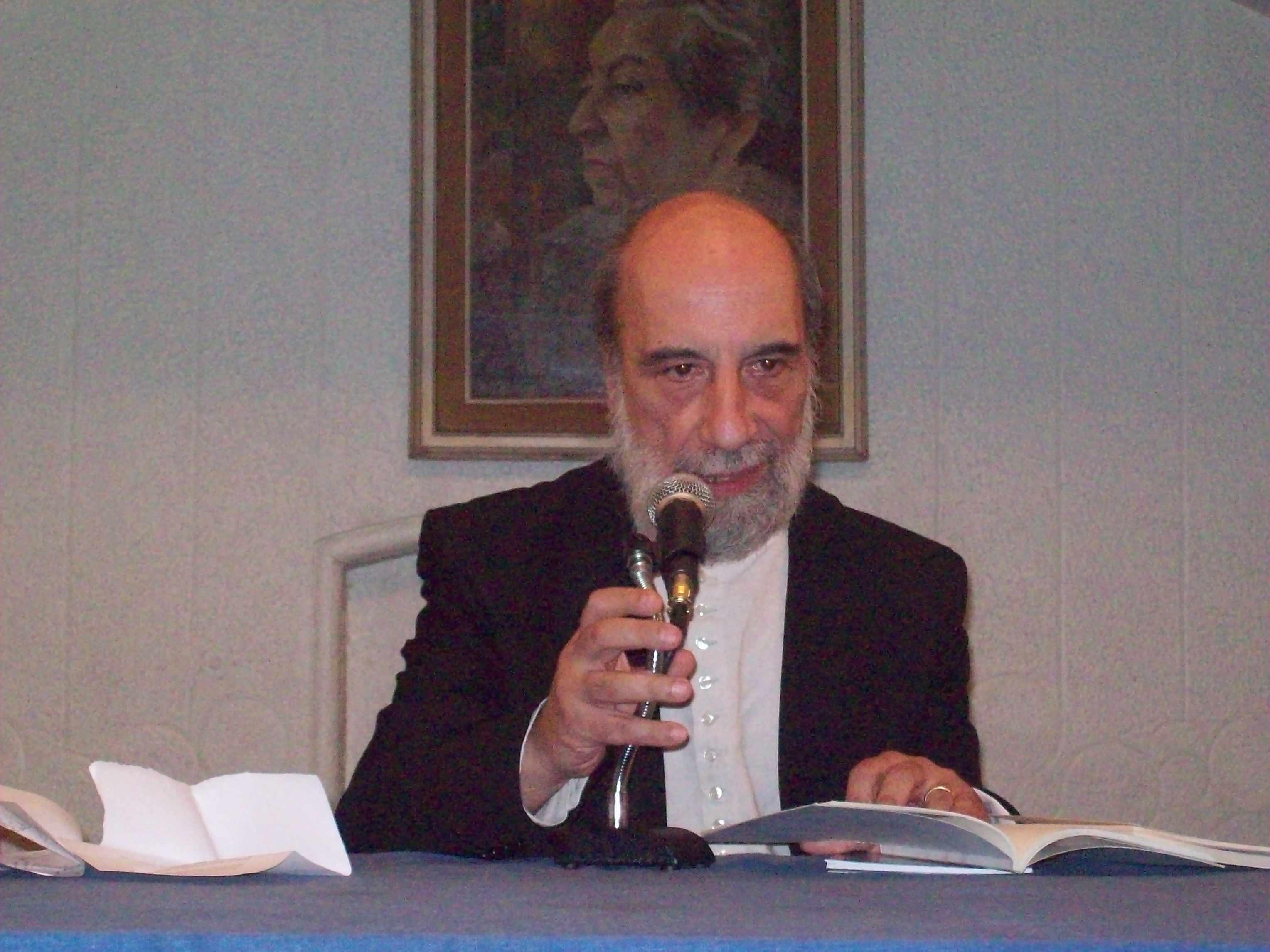 Fotografía del Premio Nacional de Literatura Raúl Zurita.